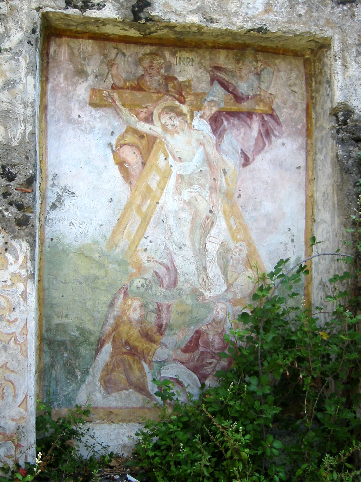 Affresco della Deposizione di Cristo, Autore ignoto 1450/1550 circa Chiesa della Misericordia di Malpasso (Mompilieri)